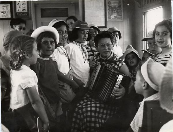 טיול ילדי פתח תקוה ברכבת. המורה רחל חננית מנגנת באקורדיון